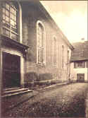 Ehemalige Synagoge in Cernay